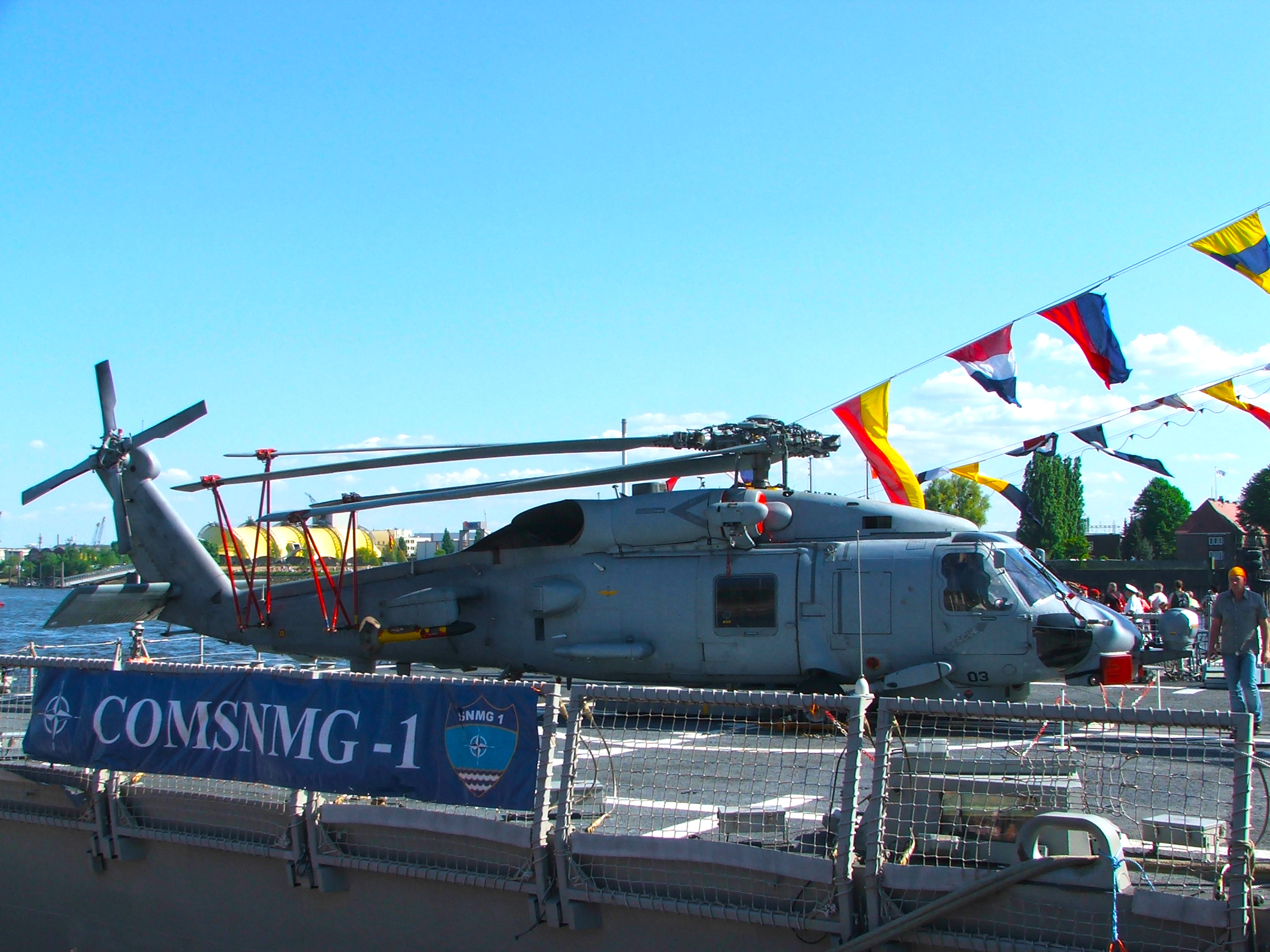 Sikorsky SH-60 Seahawk mit eingeklapptem Rotor auf dem Achterdeck einer Fregatte der Standing NATO Maritime Group 1